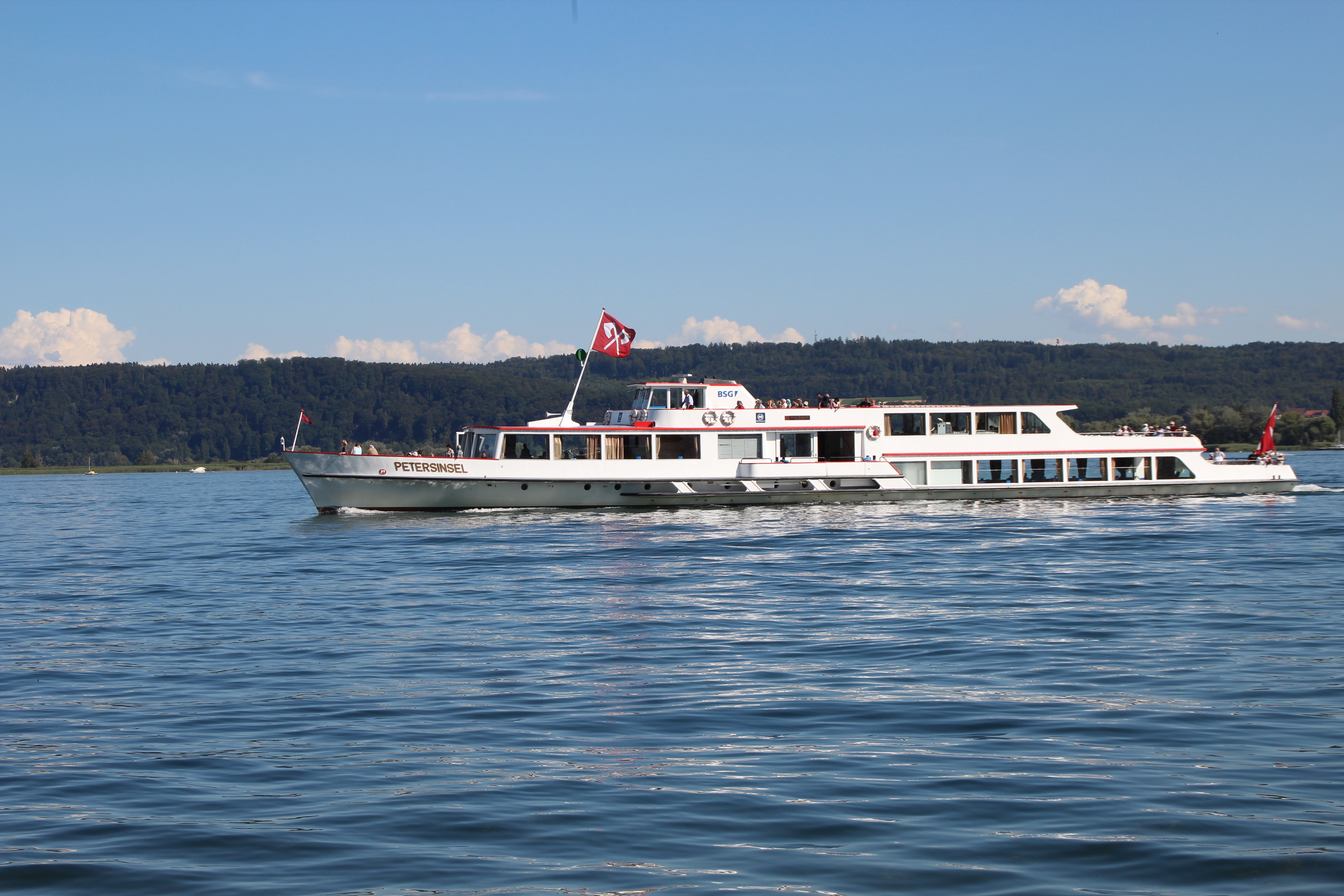 Schiff "Petersinsel" auf dem Bielersee